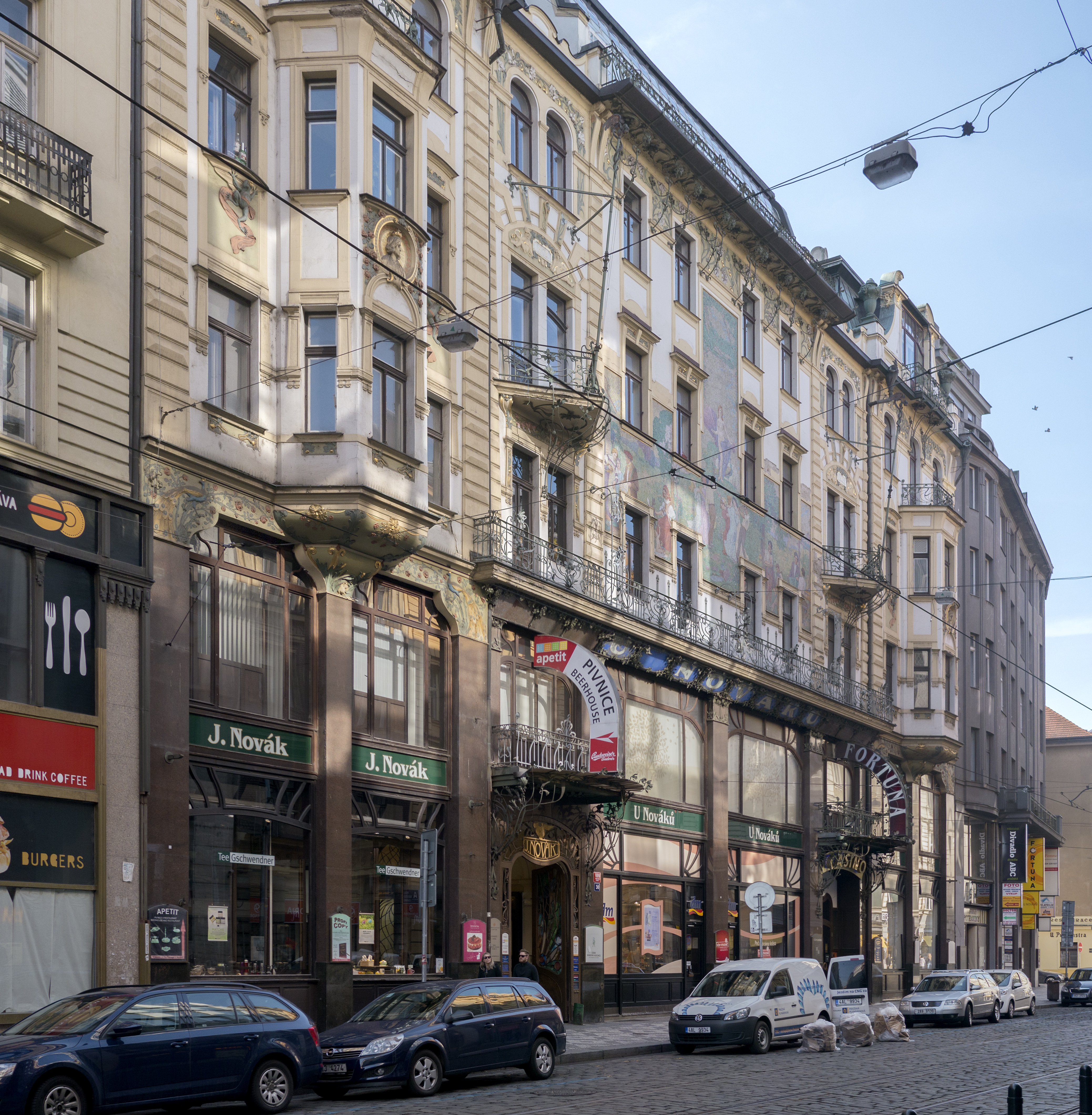 Dům U Nováků